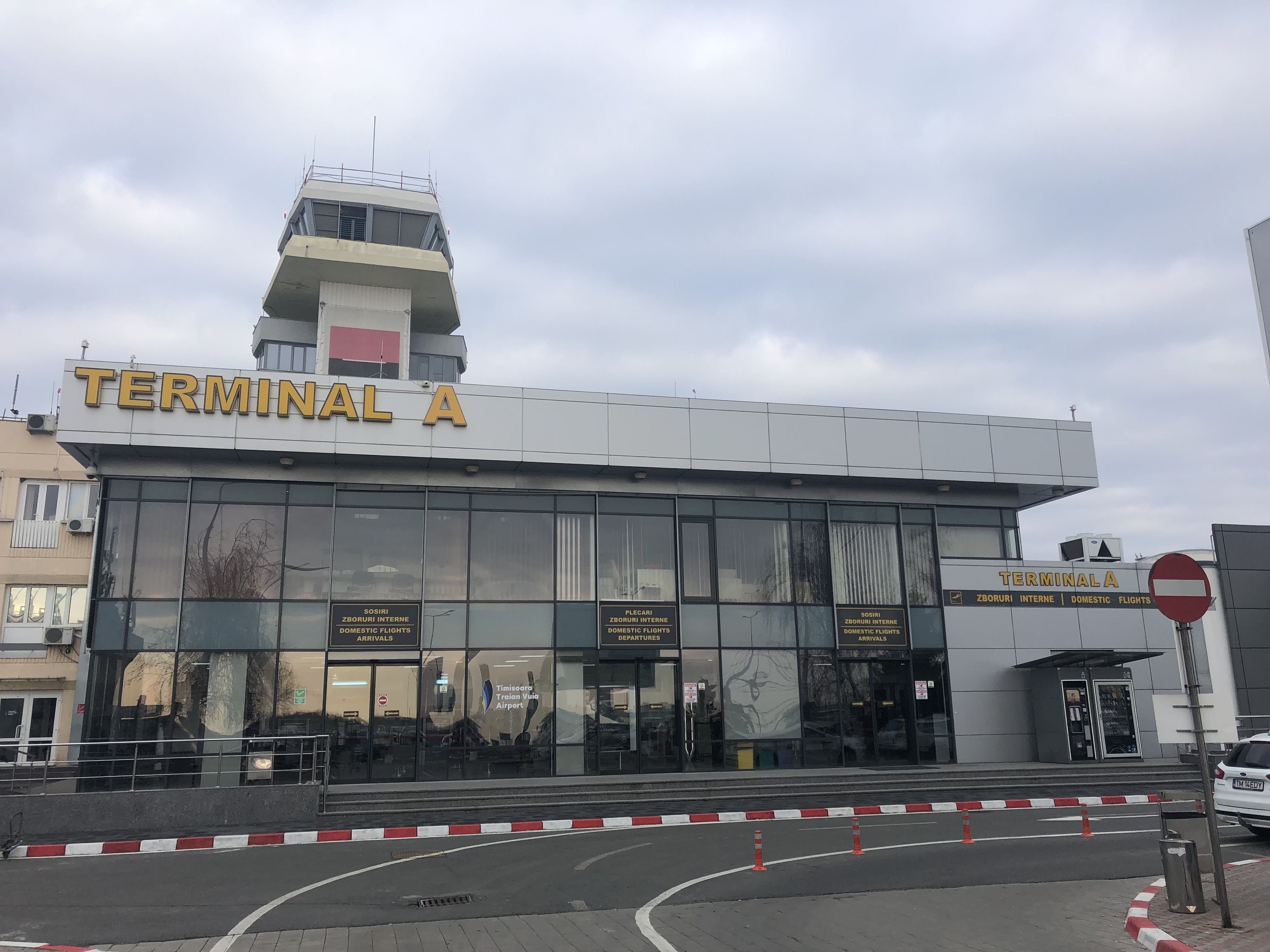 Terminal A Flughafen Timisoara